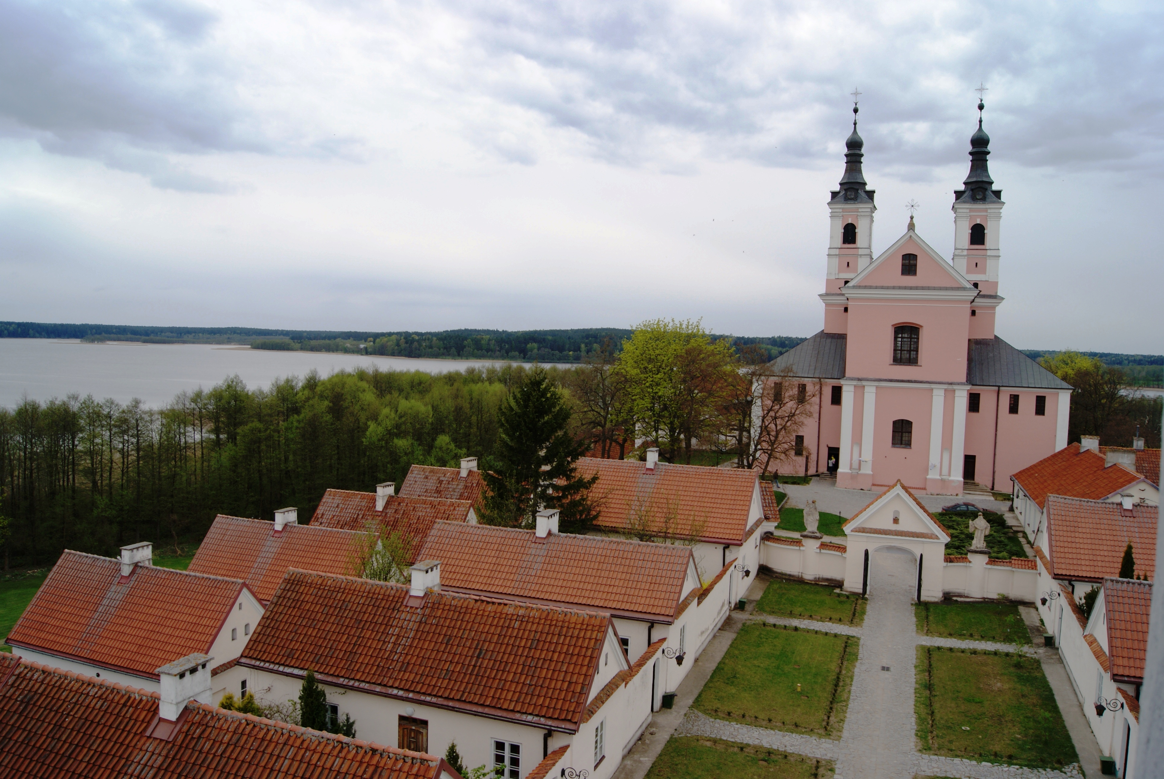 Klasztor